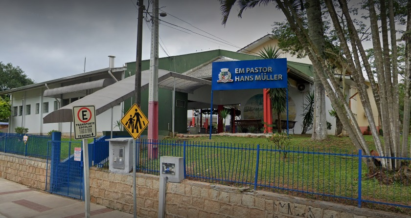 EMEF Hans Müller